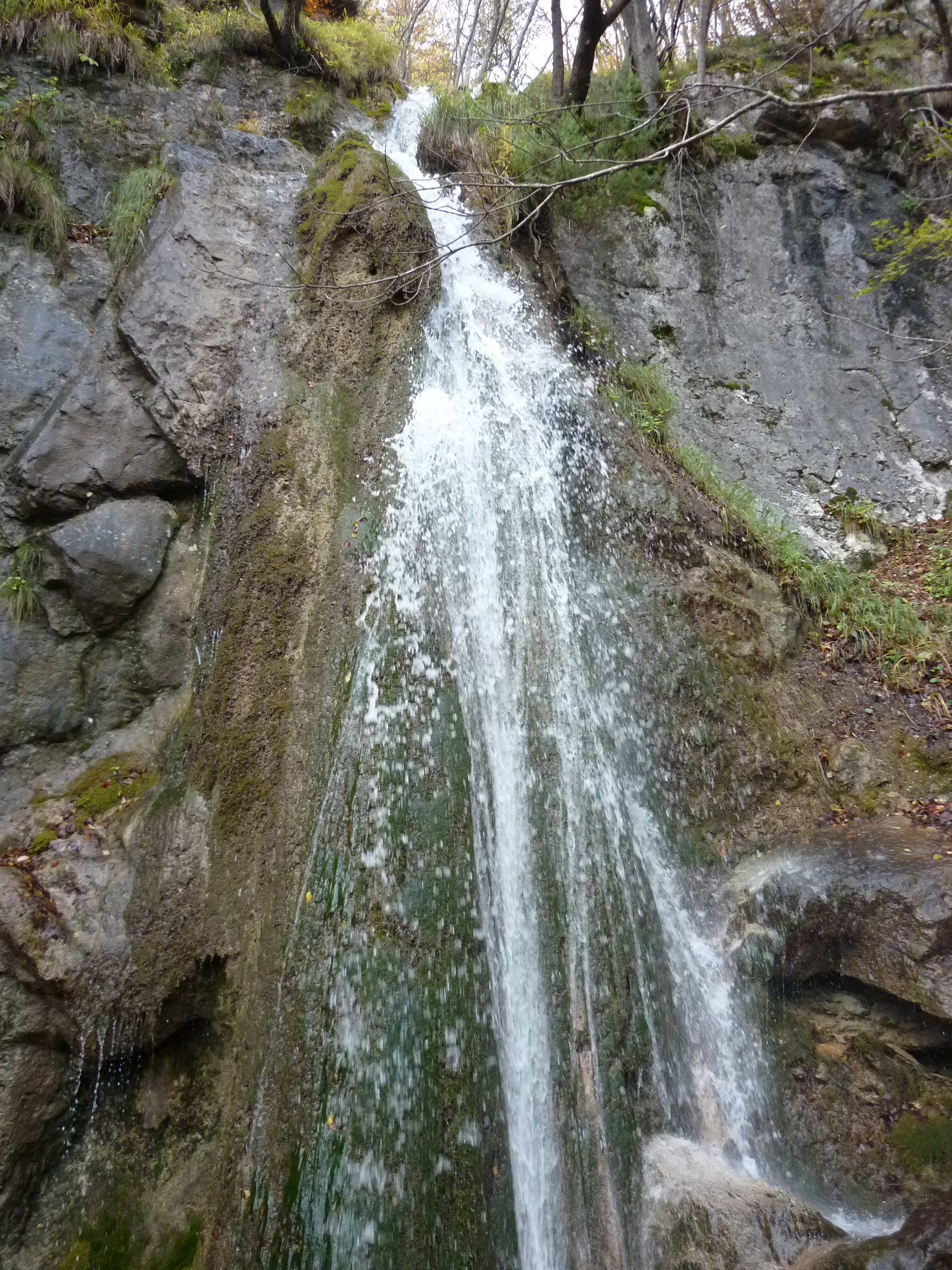 Slap na Žumberačko-samoborskom gorju